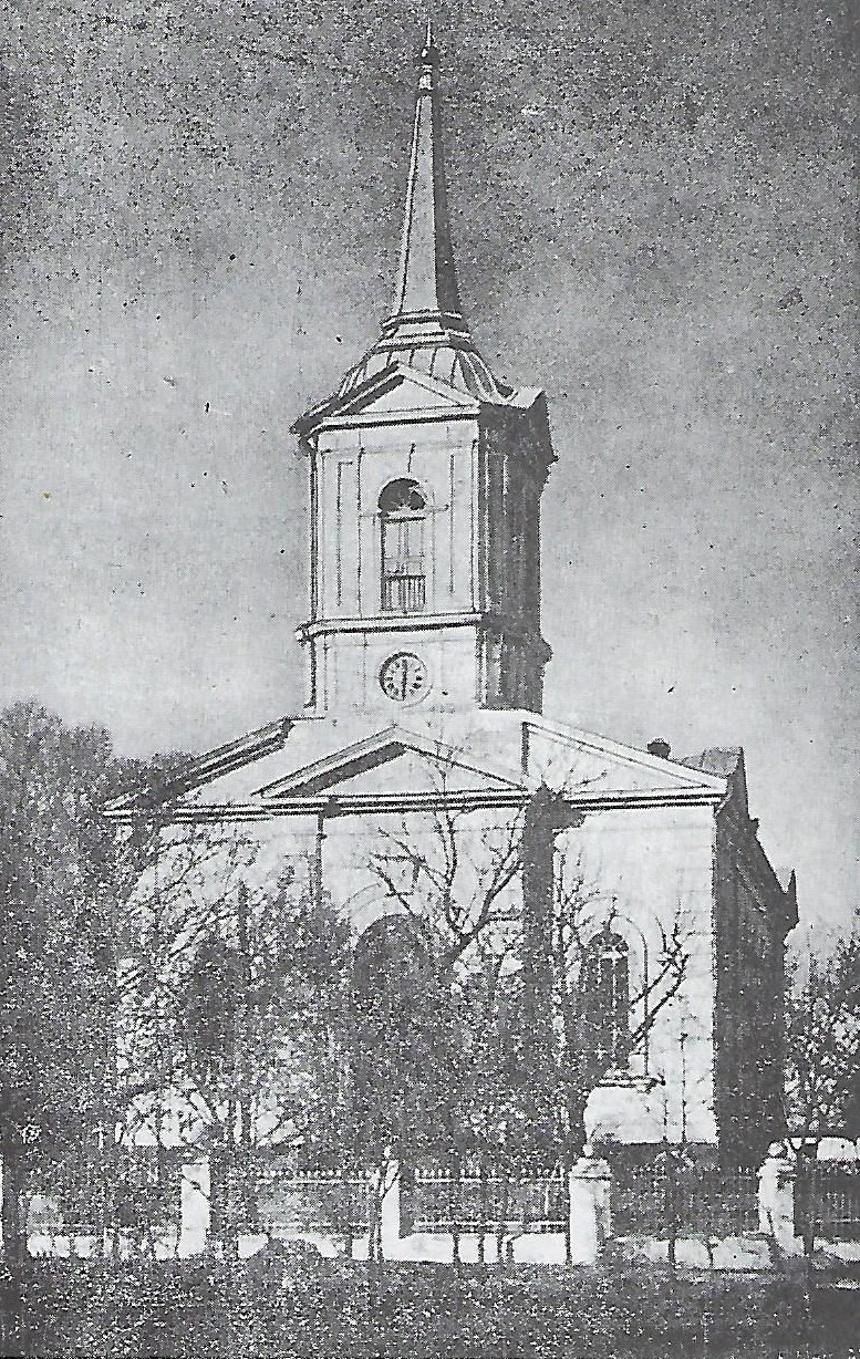 Evangelische Kirche der Bessarabiendeutschen in Tarutino, gebaut 1862–1865.